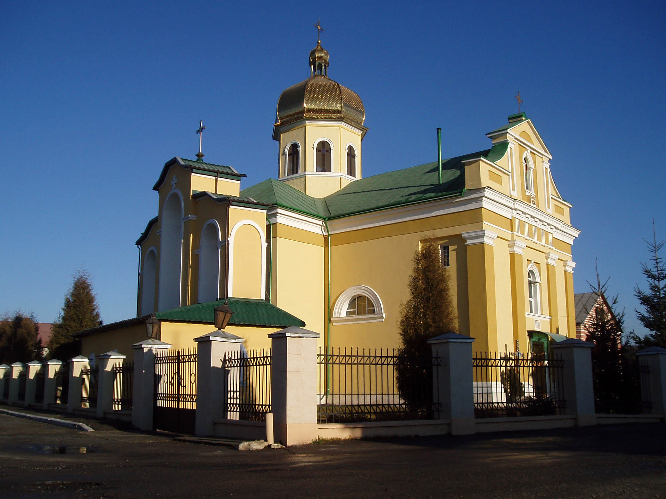 Церква в Розвадові. Збудована в середині XIX ст.